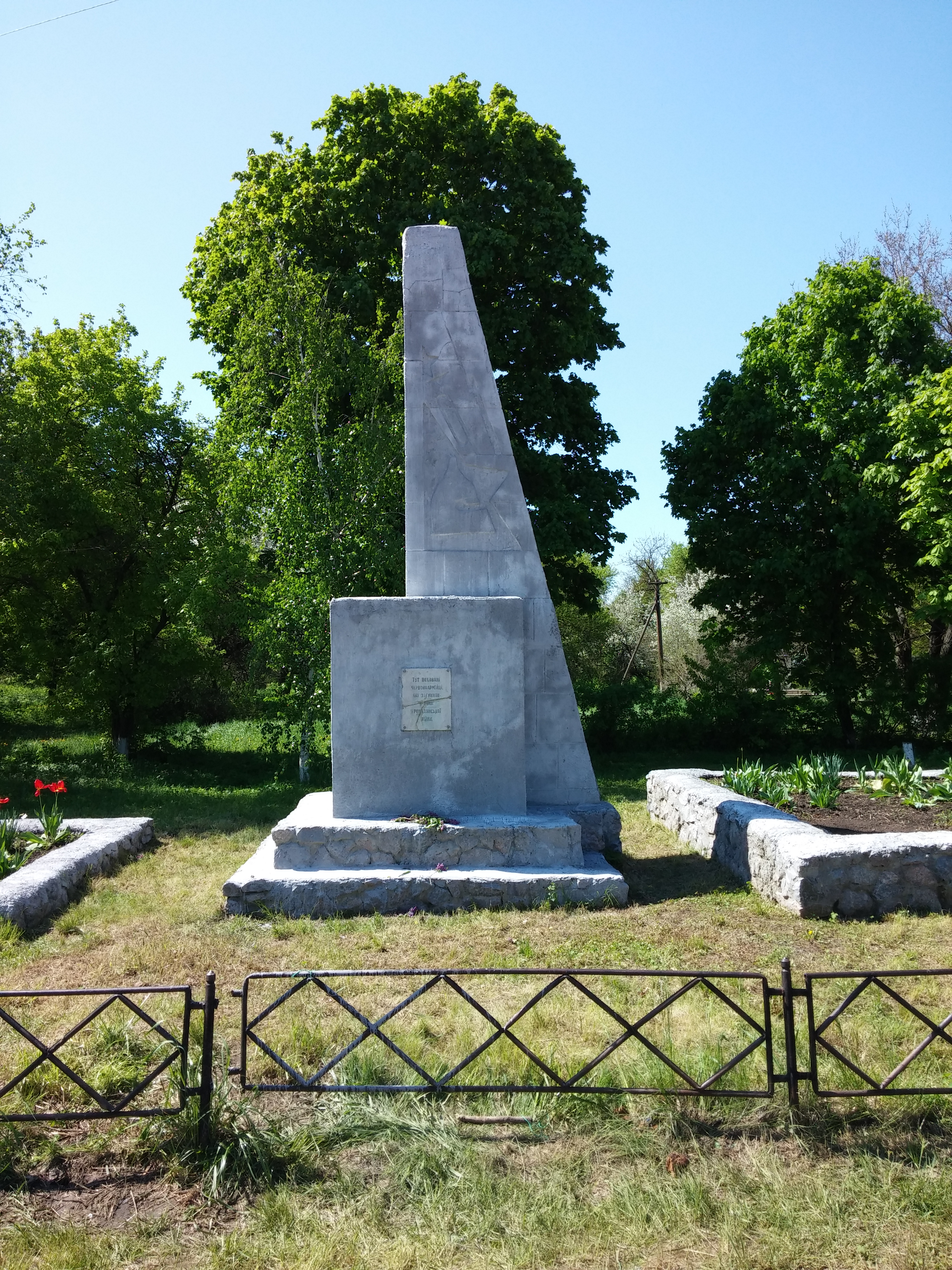 Пам'ятник червоноармійцям, загиблим в ході Громадянської війни. Цей пам'ятник - братська могила. На околиці с. Петрівське загін червоноармійців був схоплений ворогом та після допитів заживо похований на цьому місці. Пізніше тут був встановлений меморіал